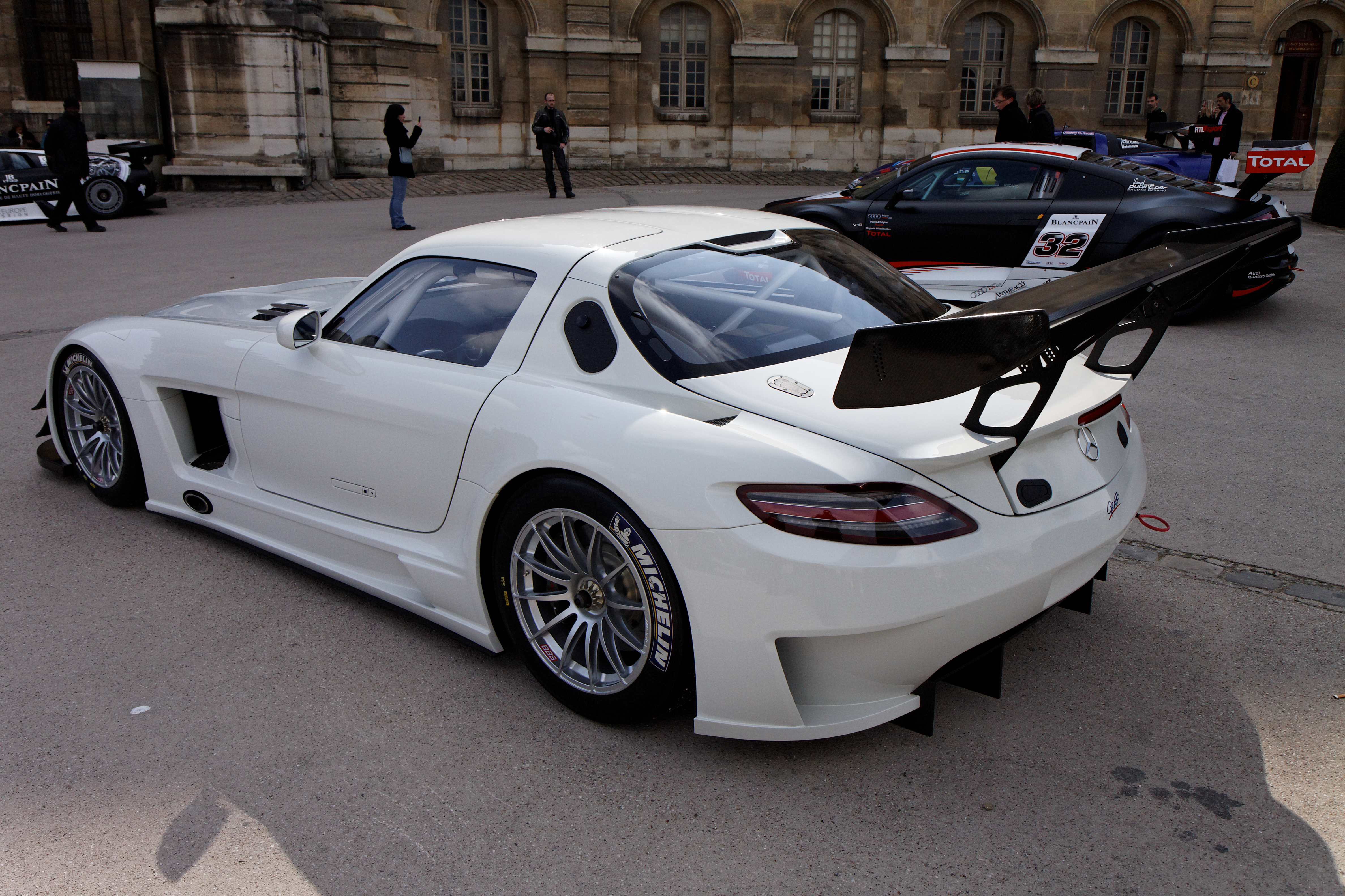 Photographie prise lors de la présentation du Blancpain Endurance series aux Invalides à Paris en mars 2011.